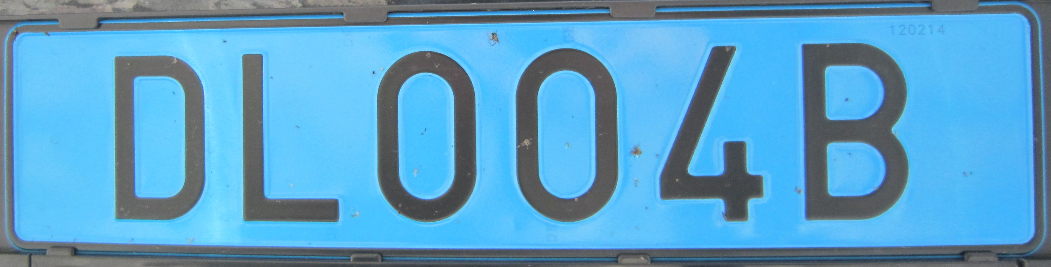 Zweden kenteken diplomaat